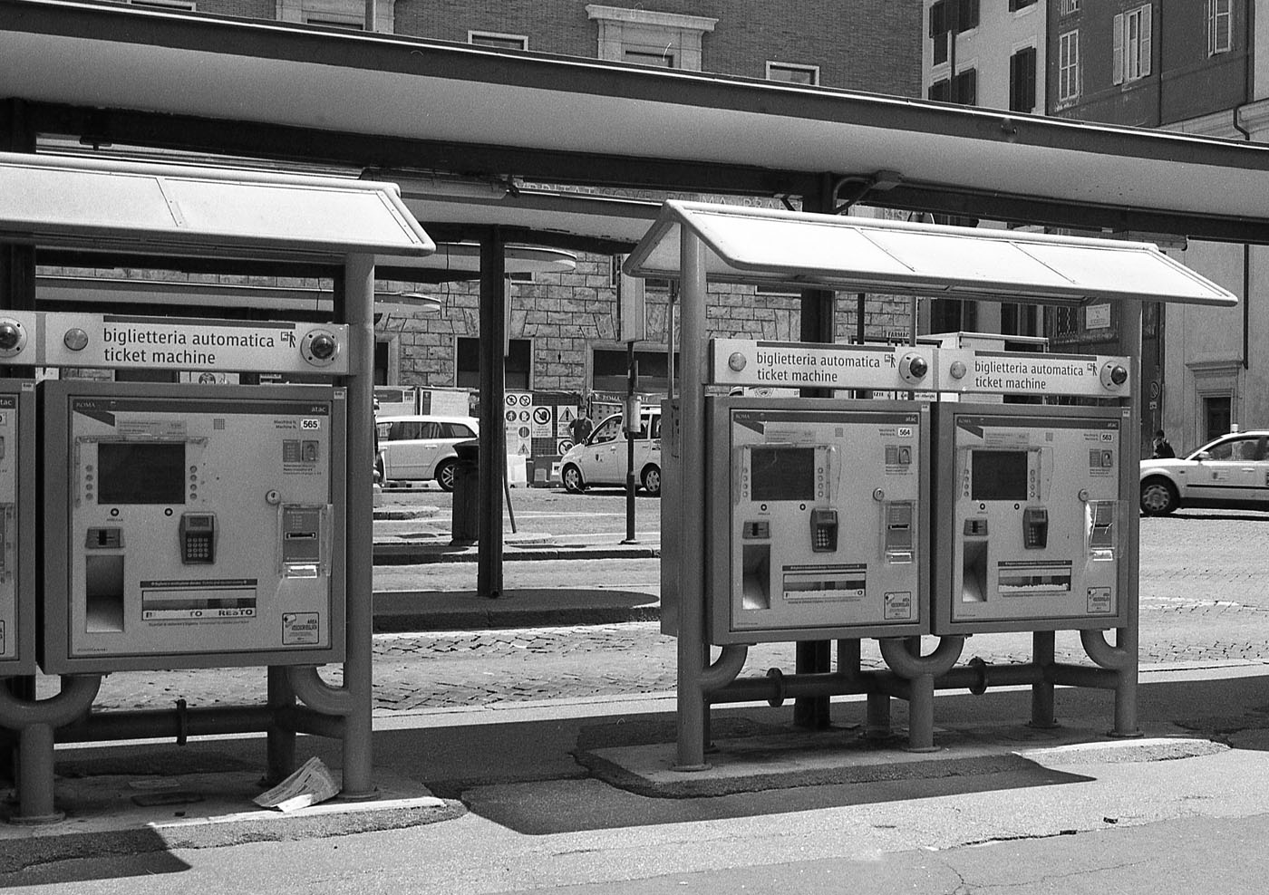 Biglietterie automatiche stradali